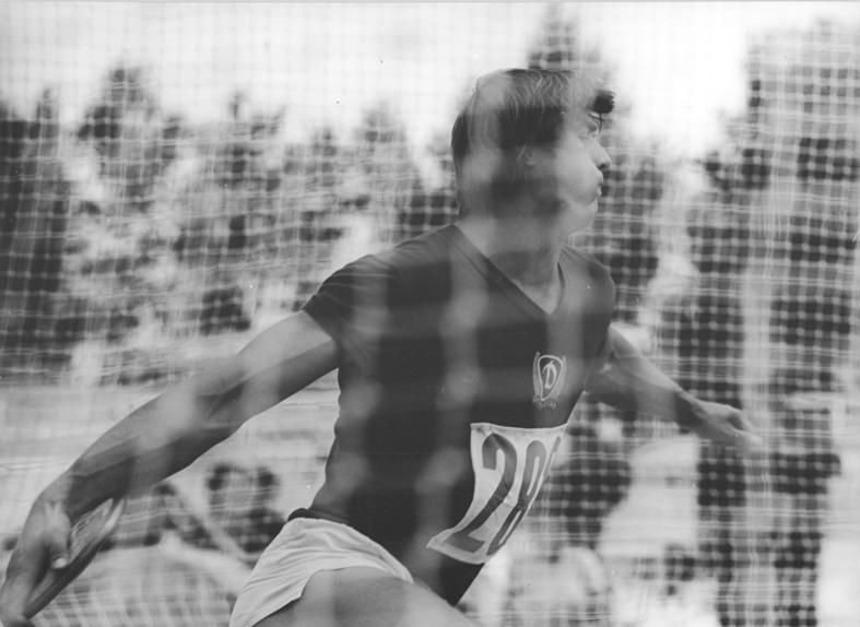 Wolfgang Schmidt ADN-ZB Mittelstädt 10.08.1974 Berlin:Schmidt Schleuderte Diskus 62,20-Bei einem Leichtathletiksportfest des SC Dynamo Berlin am 10.08.1974 erreichte Wolfgang Schmidt (Foto von einem früheren Wettkampf) mit 62,20 m im Diskus eine persönliche Bestleistung.